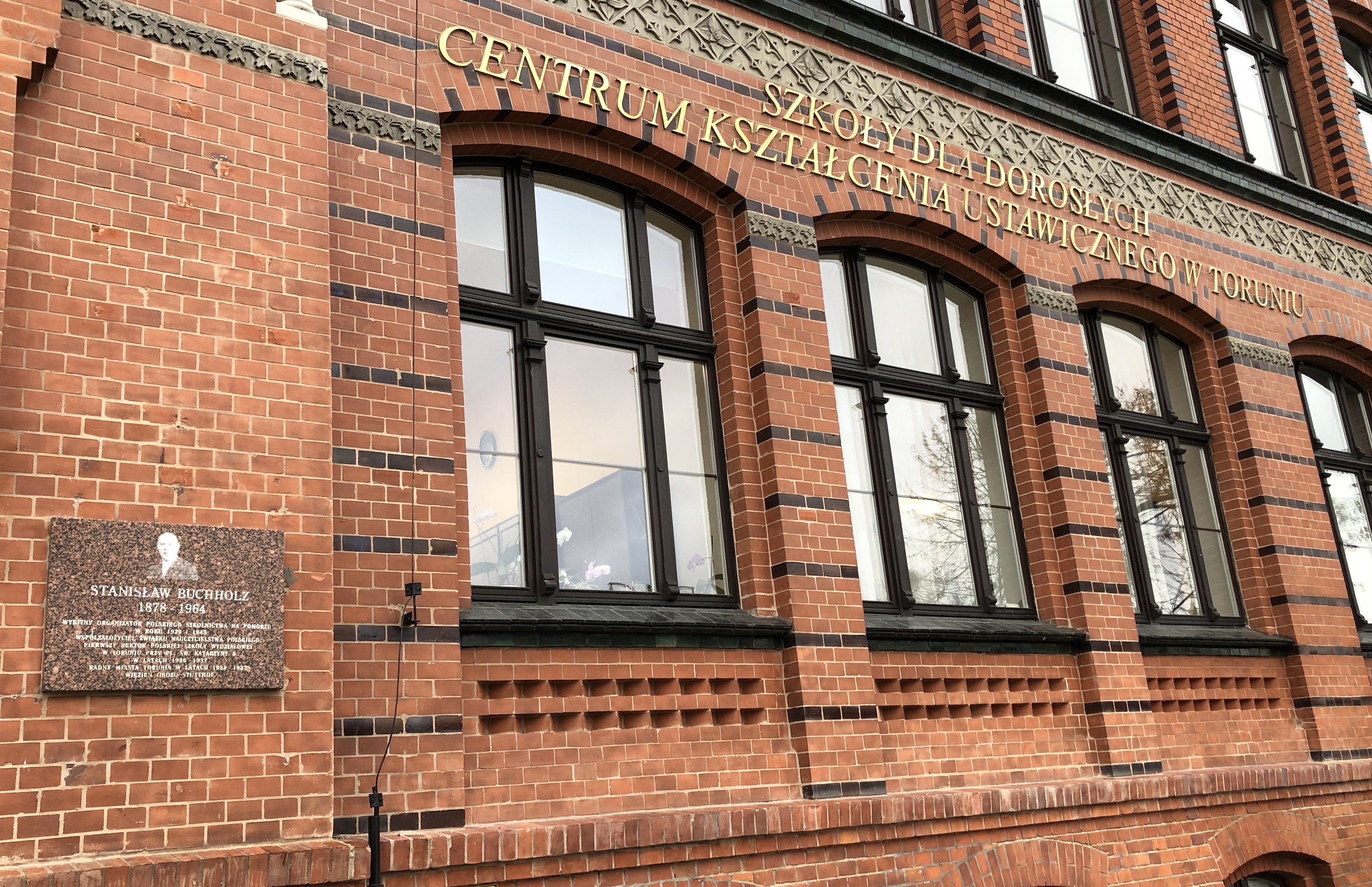 Tablica na CKU Buchholz Stanislaw